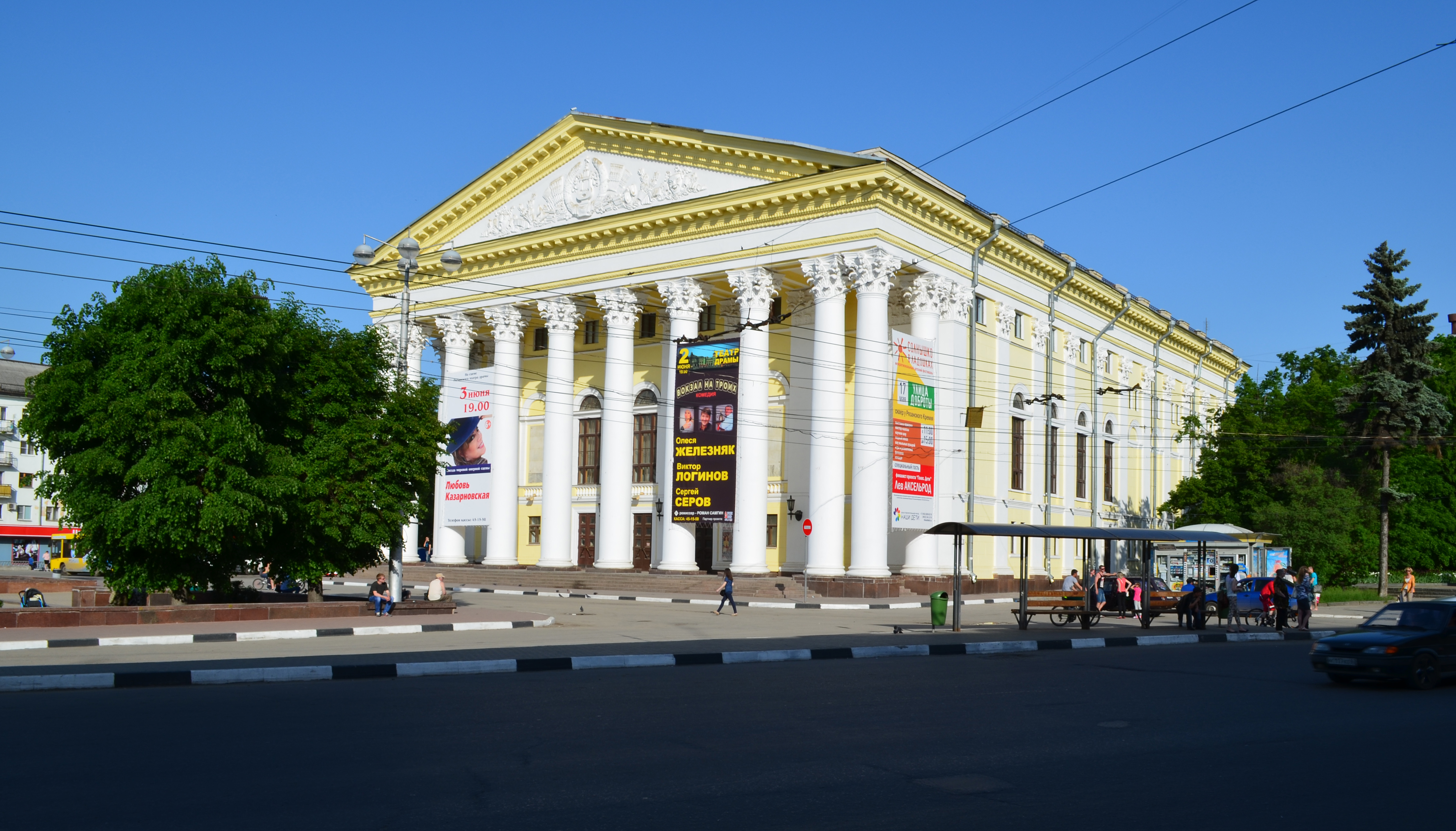 Рязанский областной государственный театр драмы.1961 г.